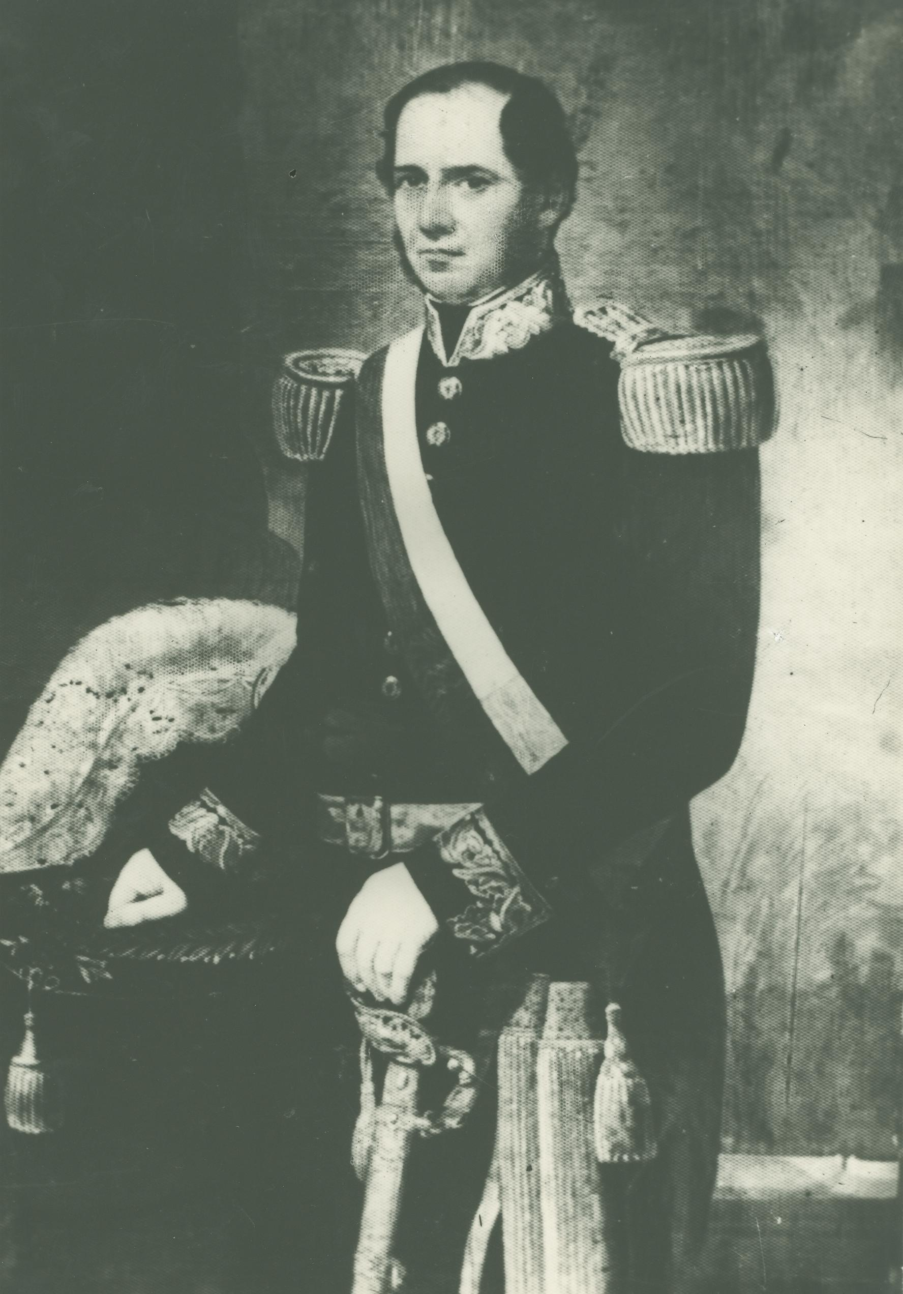 José Rufino Echenique (1808-1887), militar y político peruano. Presidente Constitucional de la República del Perú entre 1851 y 1855.